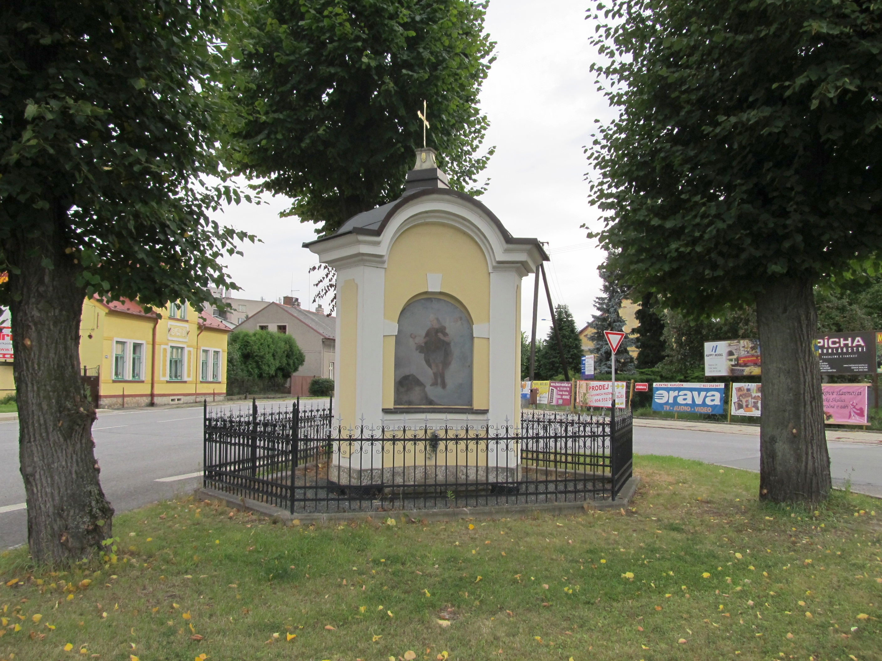 Trojboká kaplička Nejsvětější Trojice, u silnice směr Náchod u benzinové pumpy, Česká Skalice